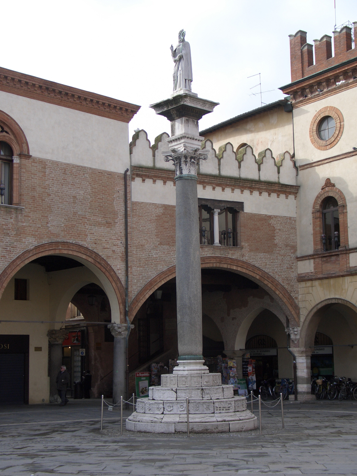 Ravenna, Italia